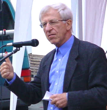 Franz Alt auf einer Friedenskundgebung in Biberach/Riß im September 2003. (Foto von Weberberg.de für die Wikipedia zur Verfügung gestellt. Weberberg.de ist die Website für Biberach.) Eigenes Foto von The weaver , GNU FDL